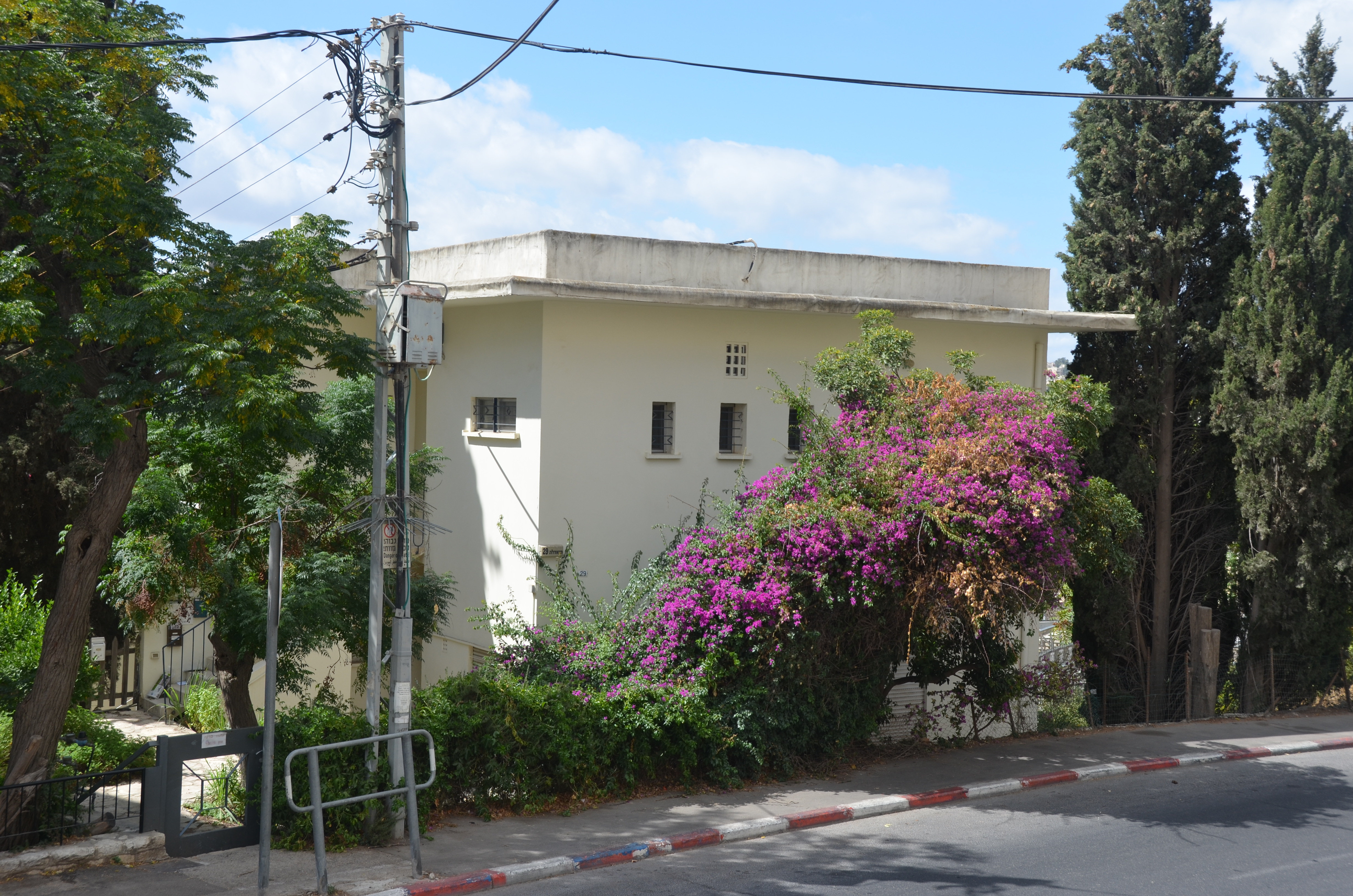 בית רוזנבאום ברחוב מטודלה בירושלים, בעיצובו של האדריכל היינץ ראו